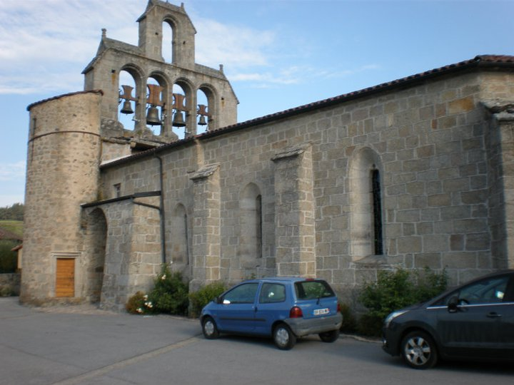 Église Saint-Barthélémy de Saint-Léger-du-Malzieu (Lozère)